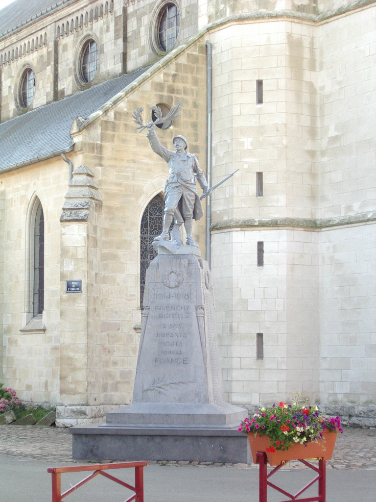 Monument aux morts Givenchy en Gohelle